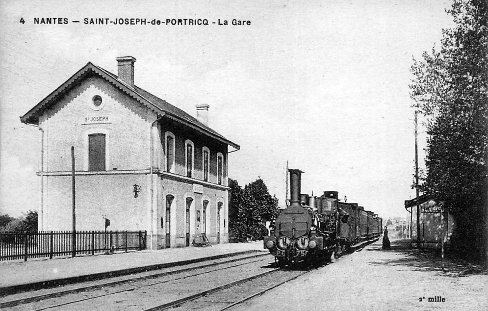 Gare et train vapeur vers 1900.